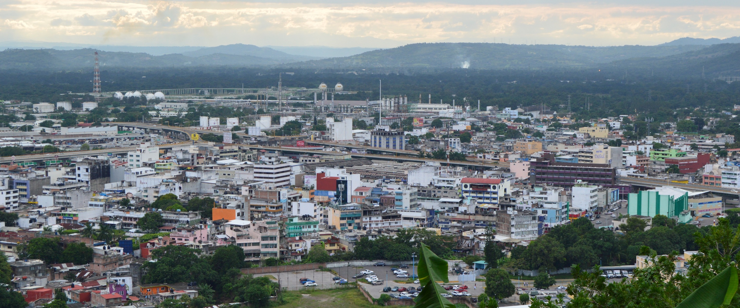 Vista del centro de la ciudad de Poza Rica de Hidalgo, Veracruz en noviembre de 2015